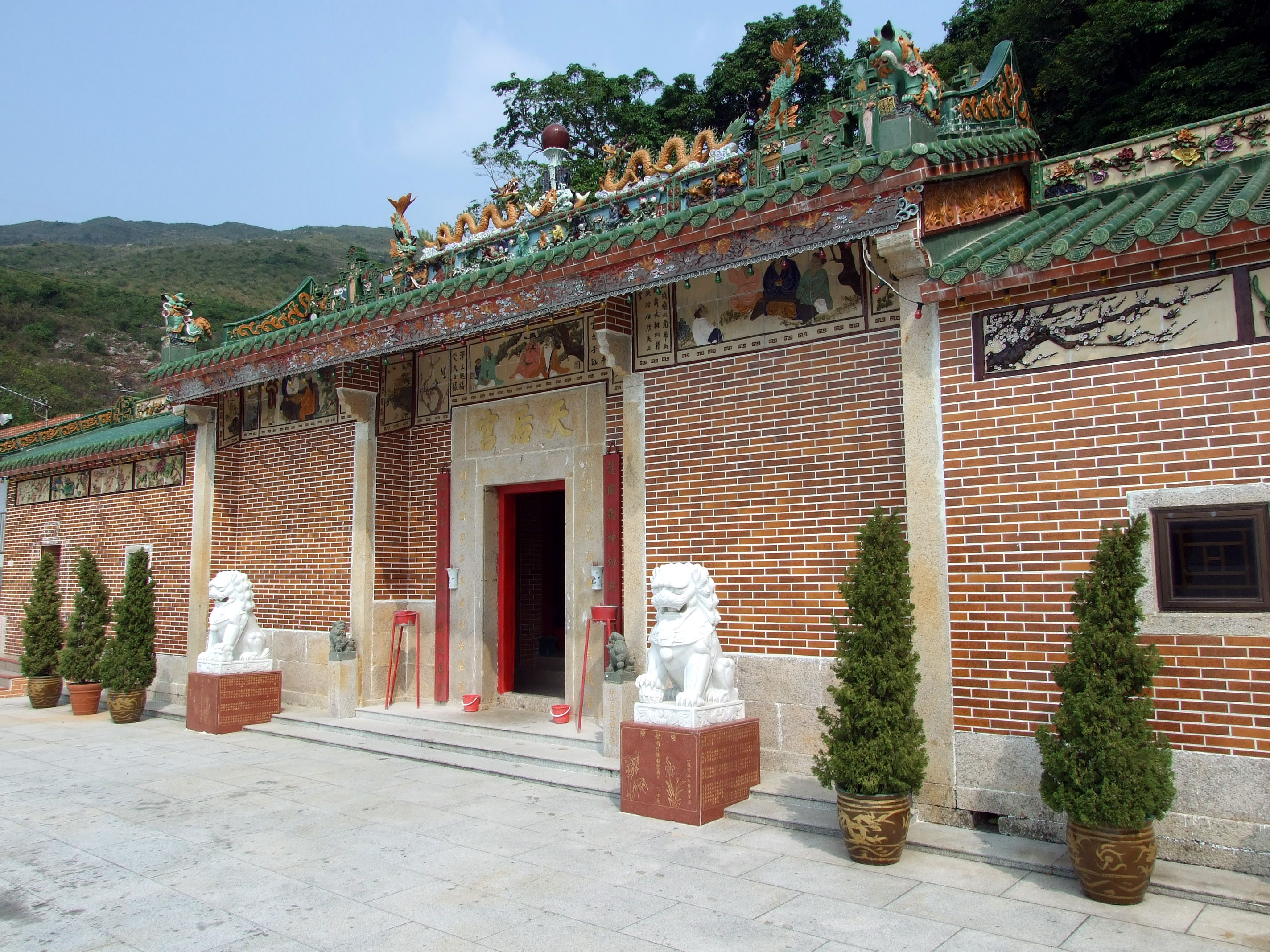 中文（香港）: 糧船灣天后宮